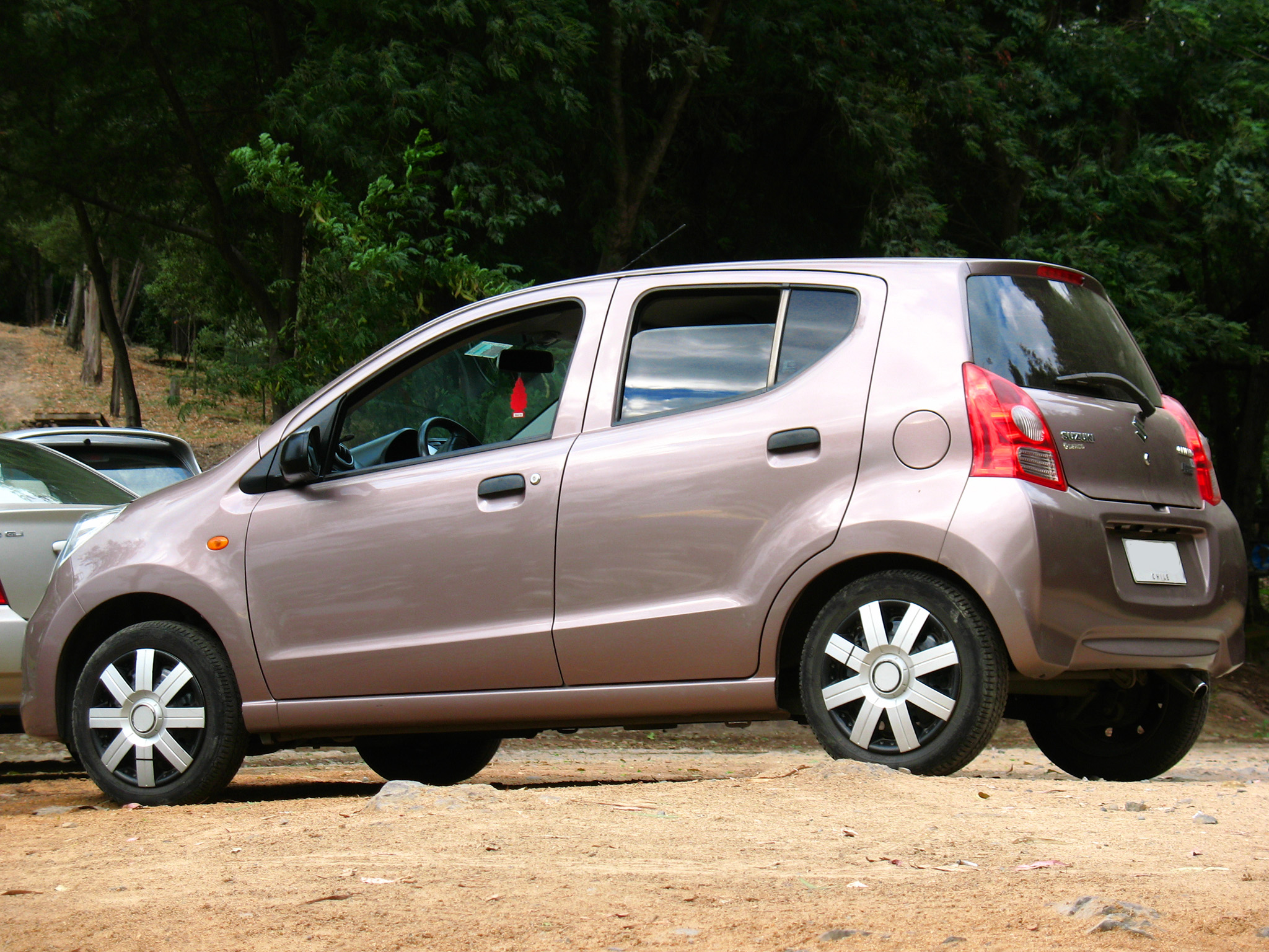 Suzuki Celerio 1.0 GA 2010